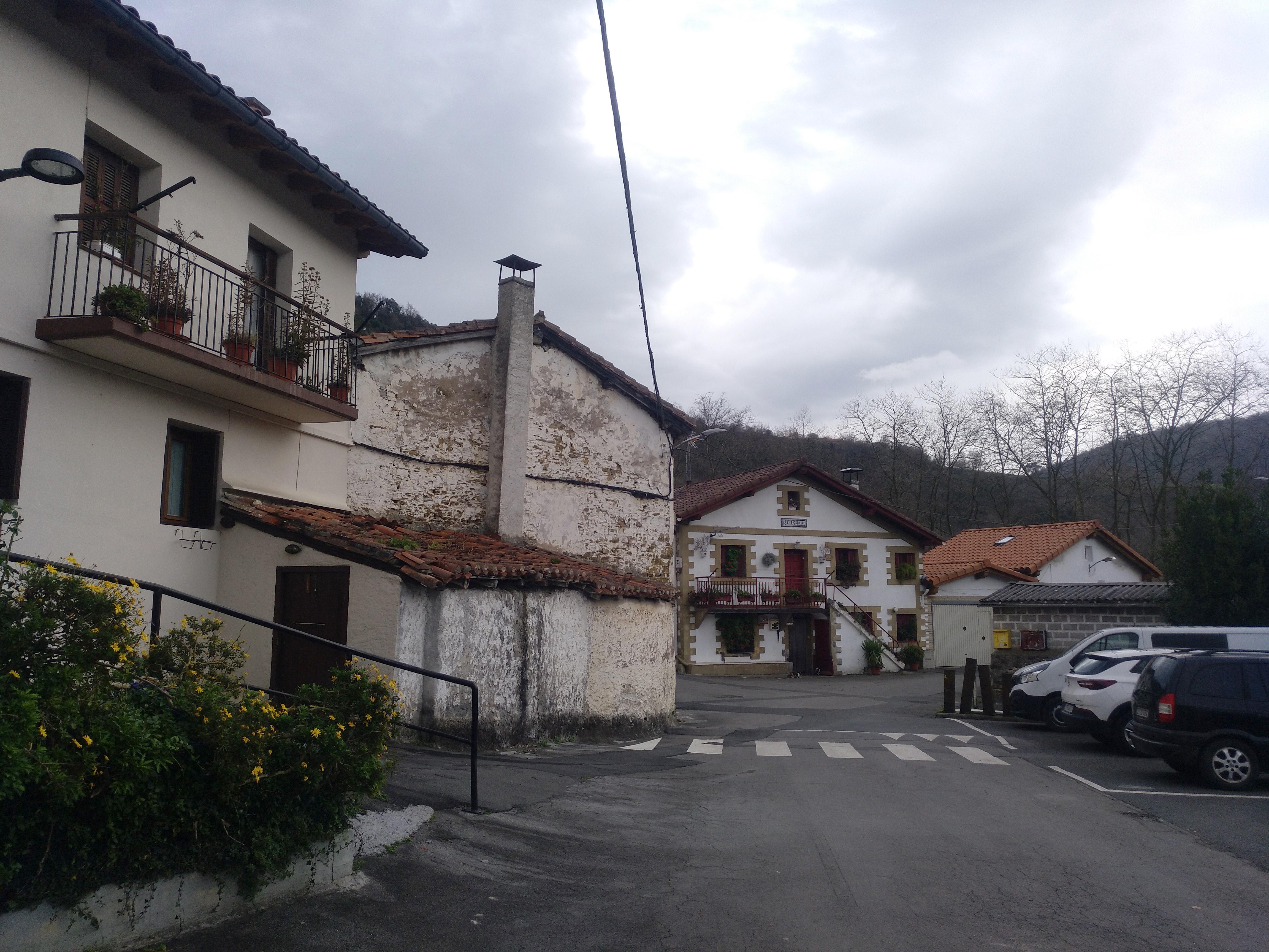 Aizarnazabalgo Zubialde auzoa